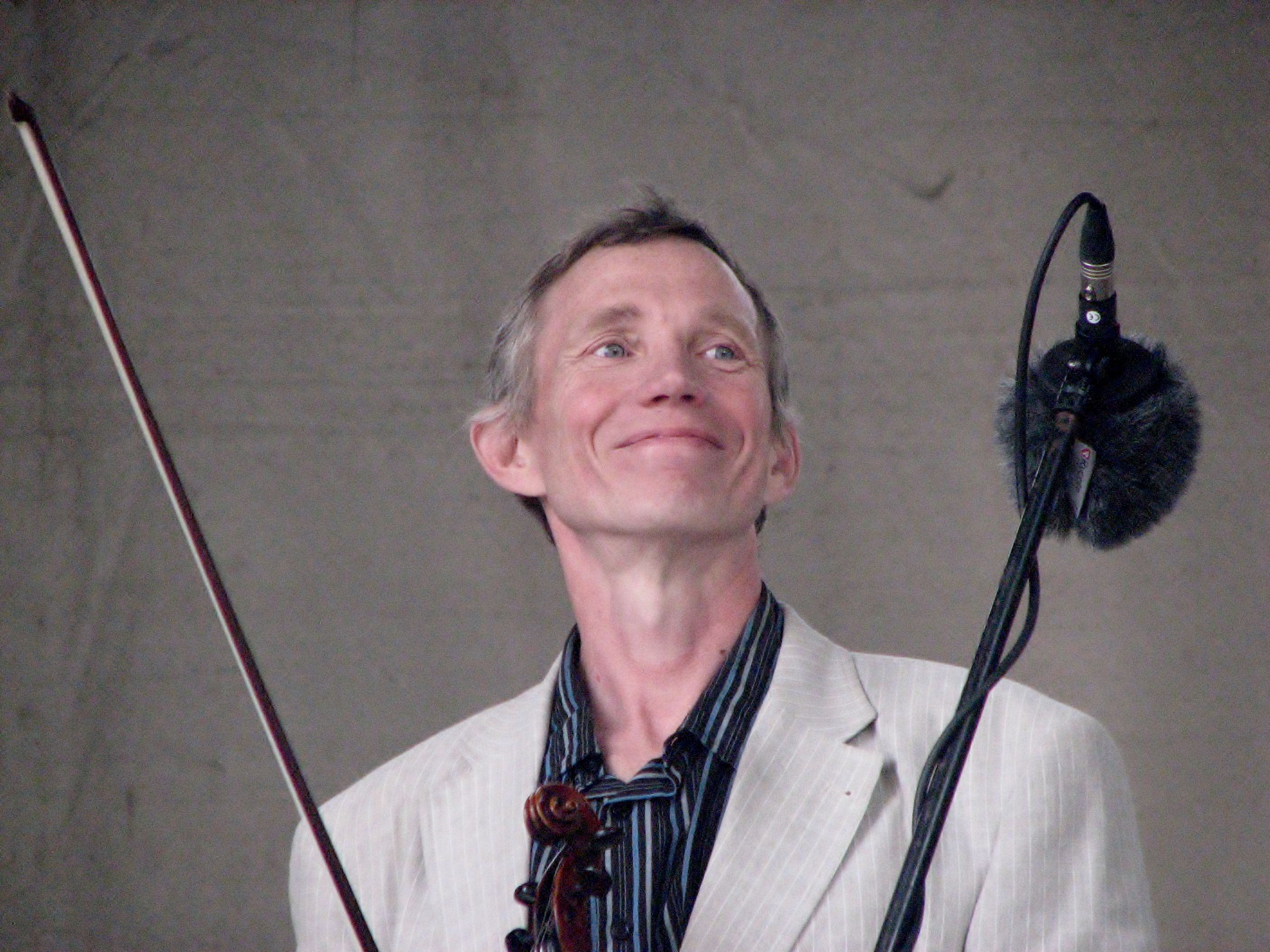 Tõnu Raadik esinemas Vaba Rahva Laulul Kuressaare lossihoovis